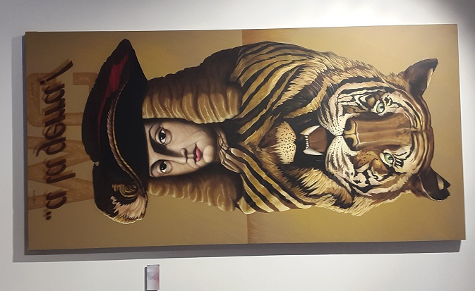 Obra realitzada per Antoni Miró de Felip V.